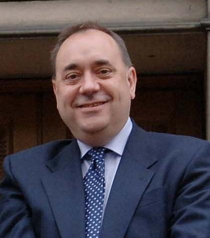 First Minister Alex Salmond